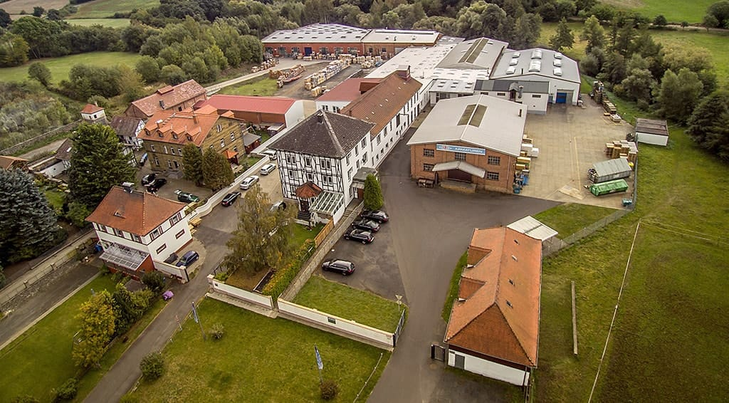 Хольцхаузен (нем. Holzhausen), где сосредоточено крупногабаритное производство типоразмерами до 1200 мм